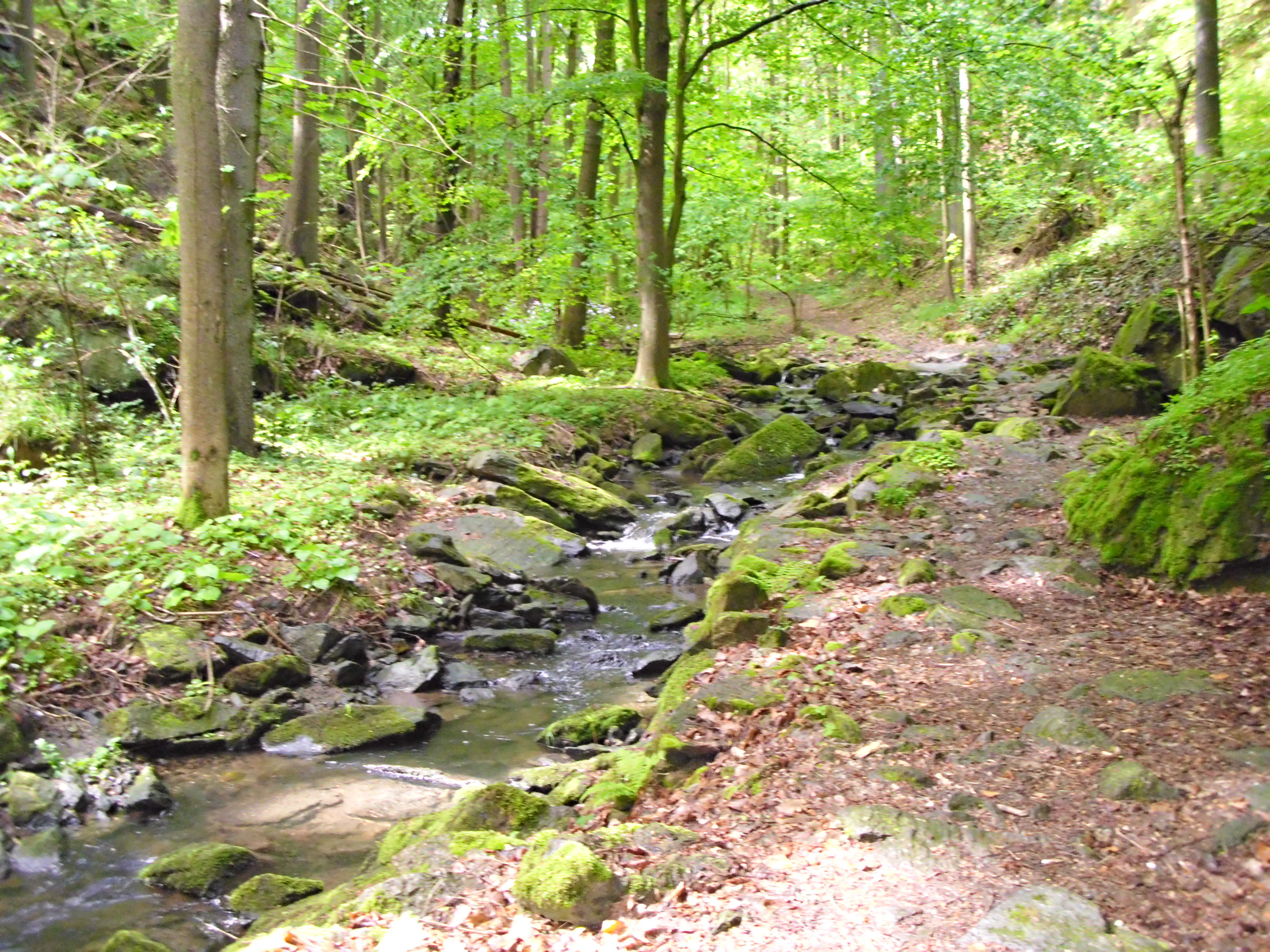 Durch den Grund fließt der Borlasbach